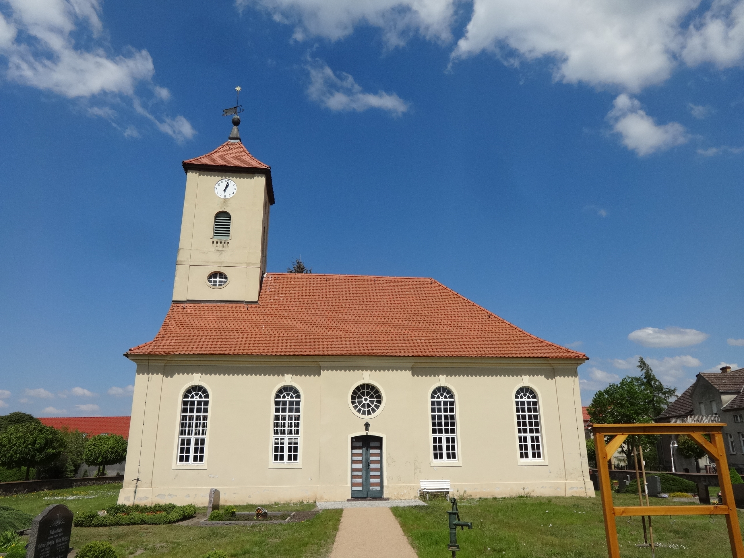 Die evangelische Dorfkirche entstand 1765 als Saalkirche. Der barocke Bau ist mit einem schlichten Putz und hohen Stichbogenfenstern versehen. Im Innern befinden sich ein Kanzelaltar aus dem 17. Jahrhundert sowie eine Schuke-Orgel aus dem Jahr 1929.